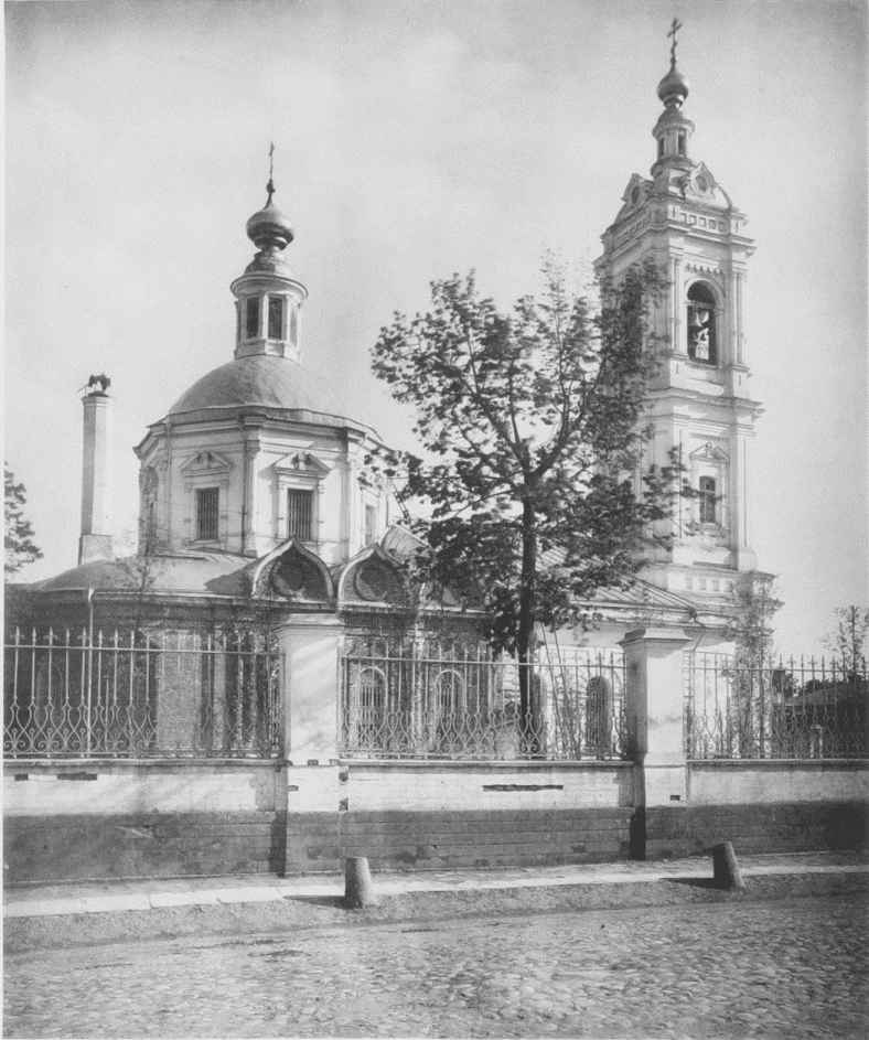 Храм прп. Пимена Великого в Новых Воротниках в Москве.